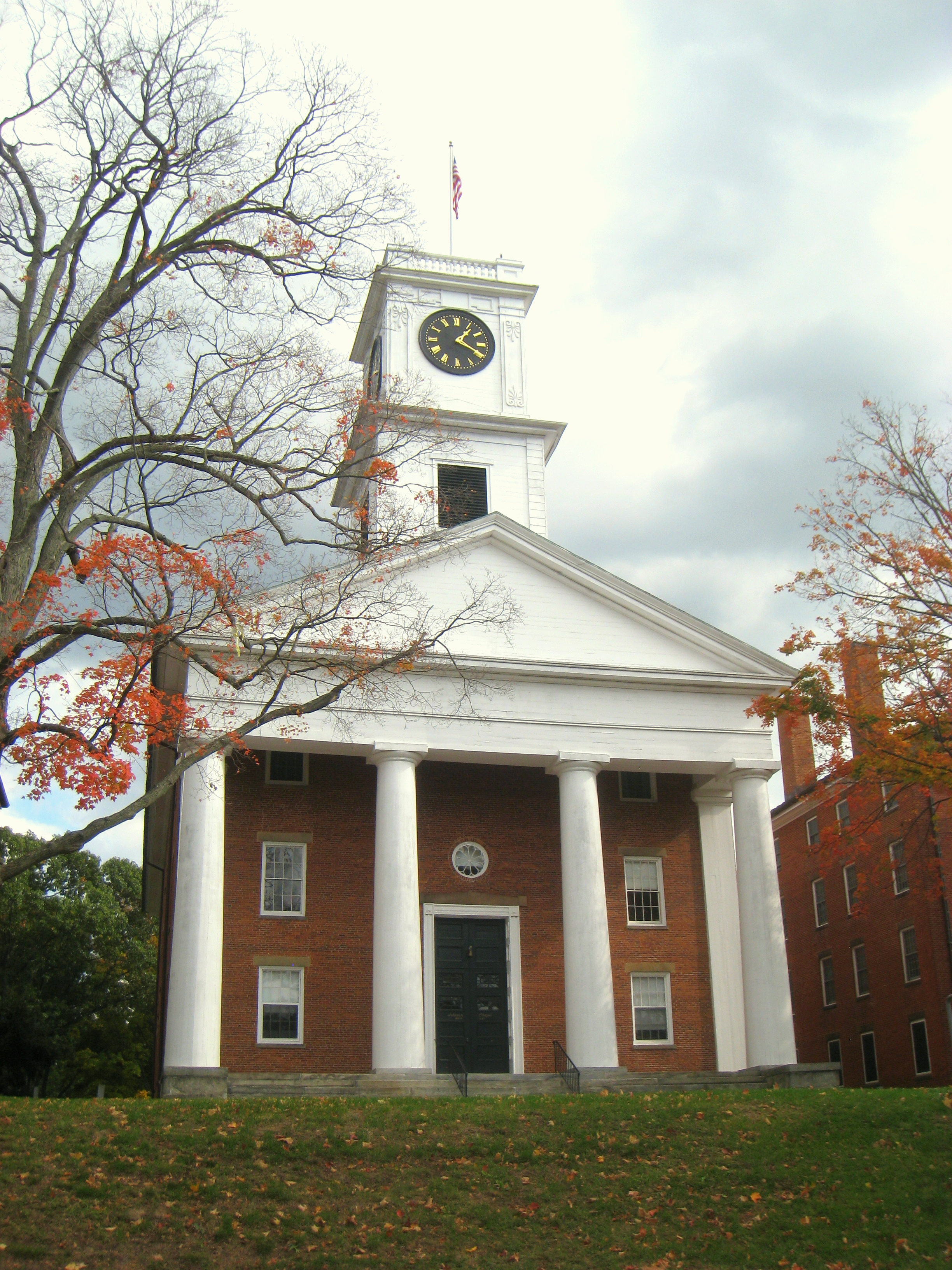 Amherst College, Amherst, Massachusetts, USA.